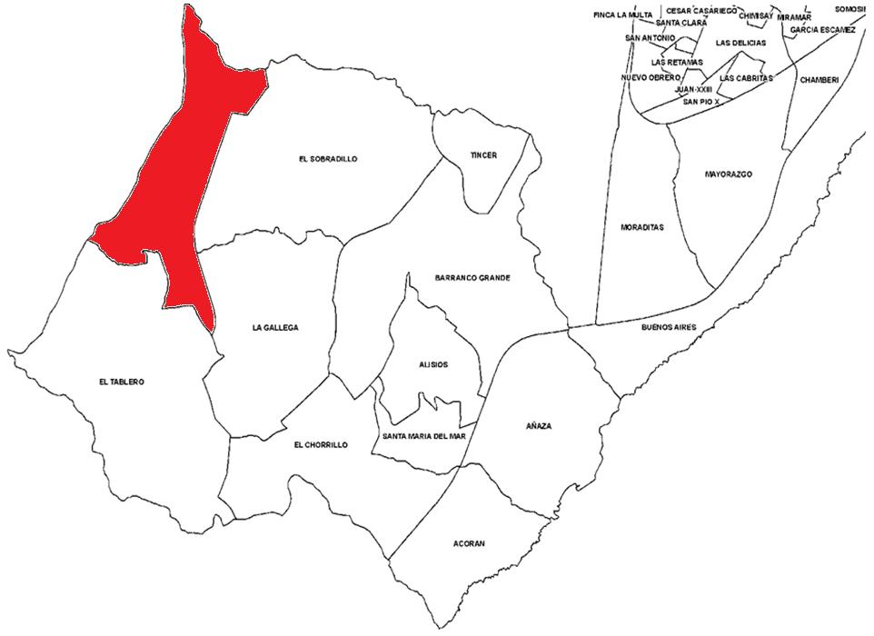 Parte del barrio perteneciente a Santa Cruz